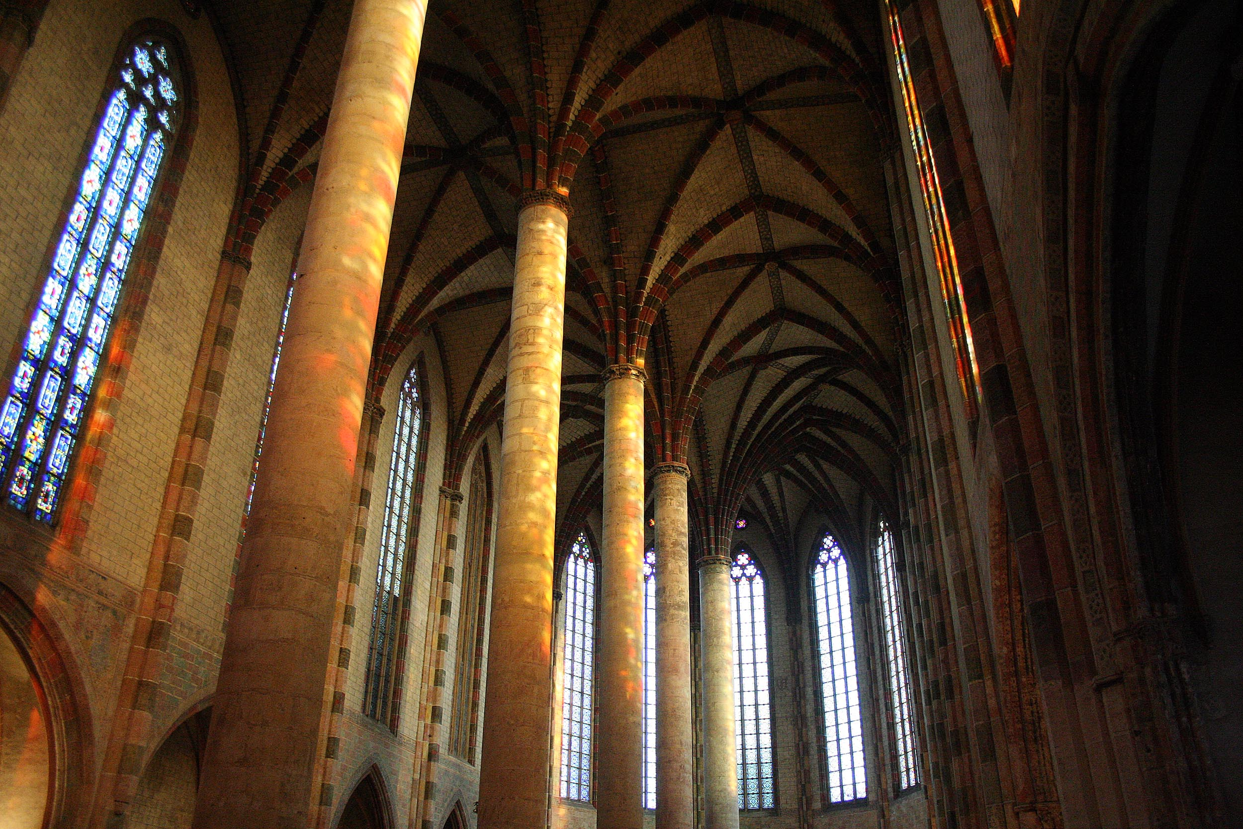 Nef de l'église des Jacobins, Toulouse